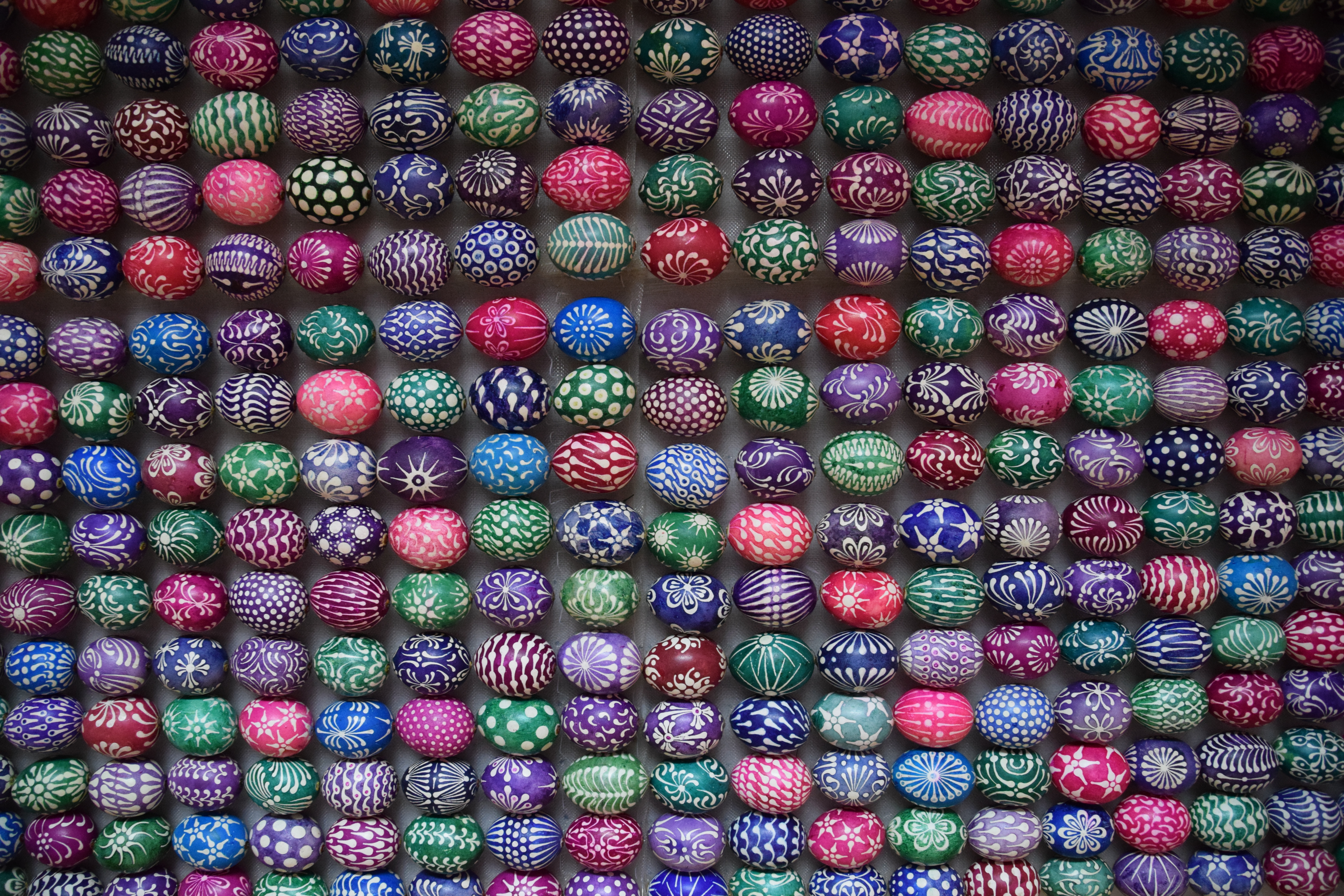 Muzeum Pisanki w Kołomyi, Ukraina